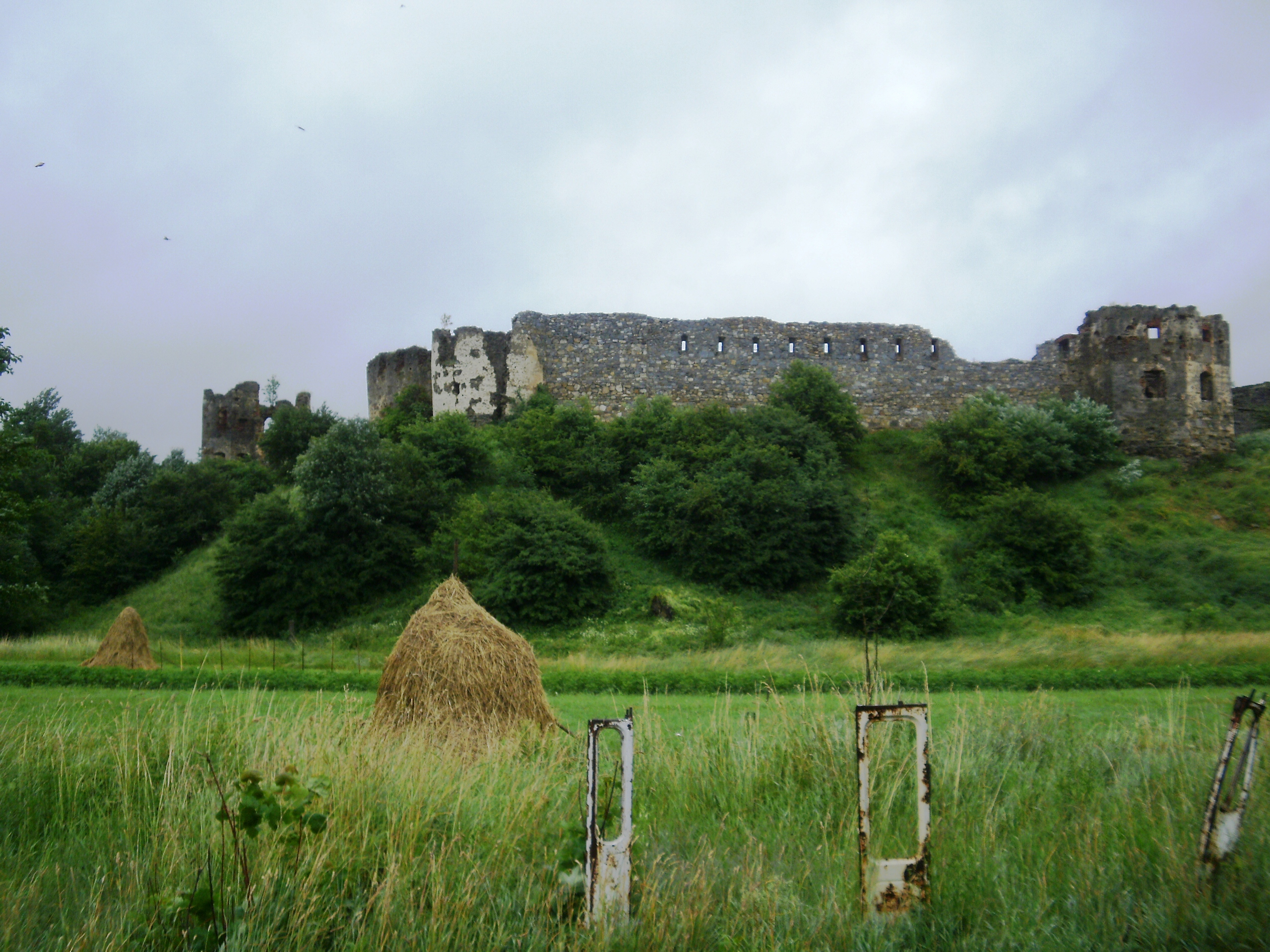 Замок, Пнів